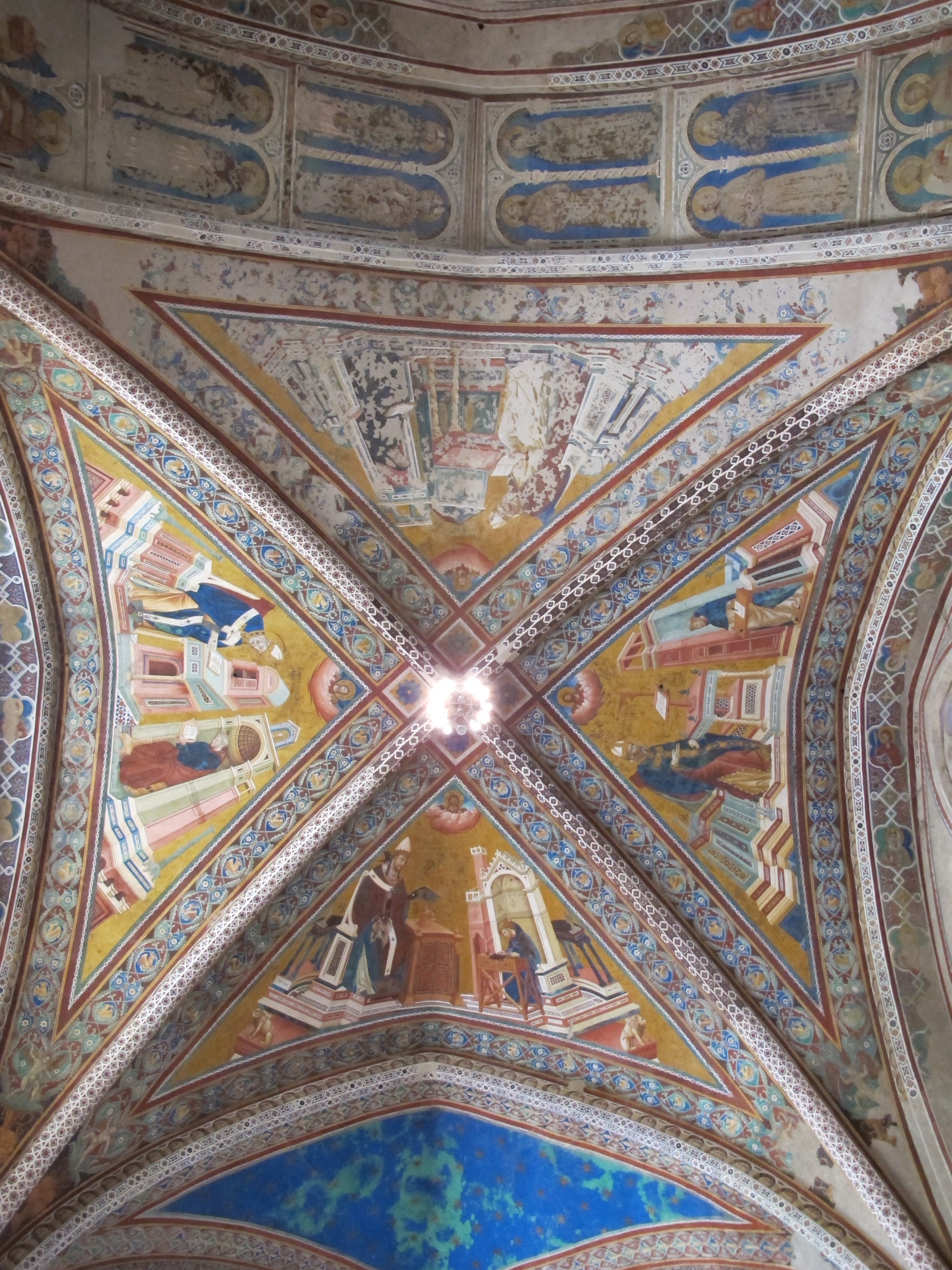 Chiesa superiore di san francesco, volta dei dottori della chiesa